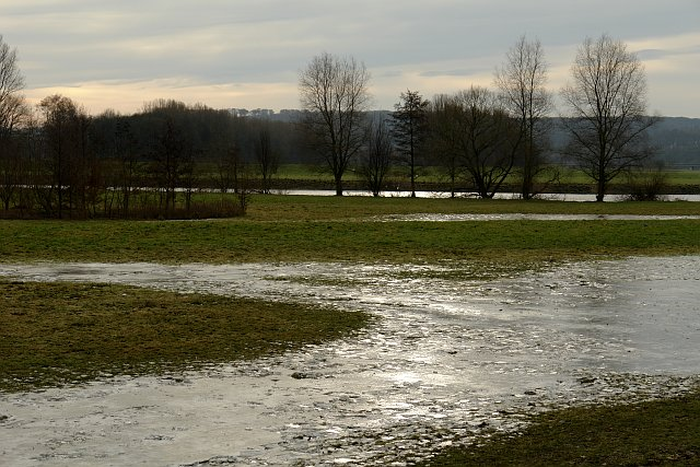 Ruhr river in Essen Steele